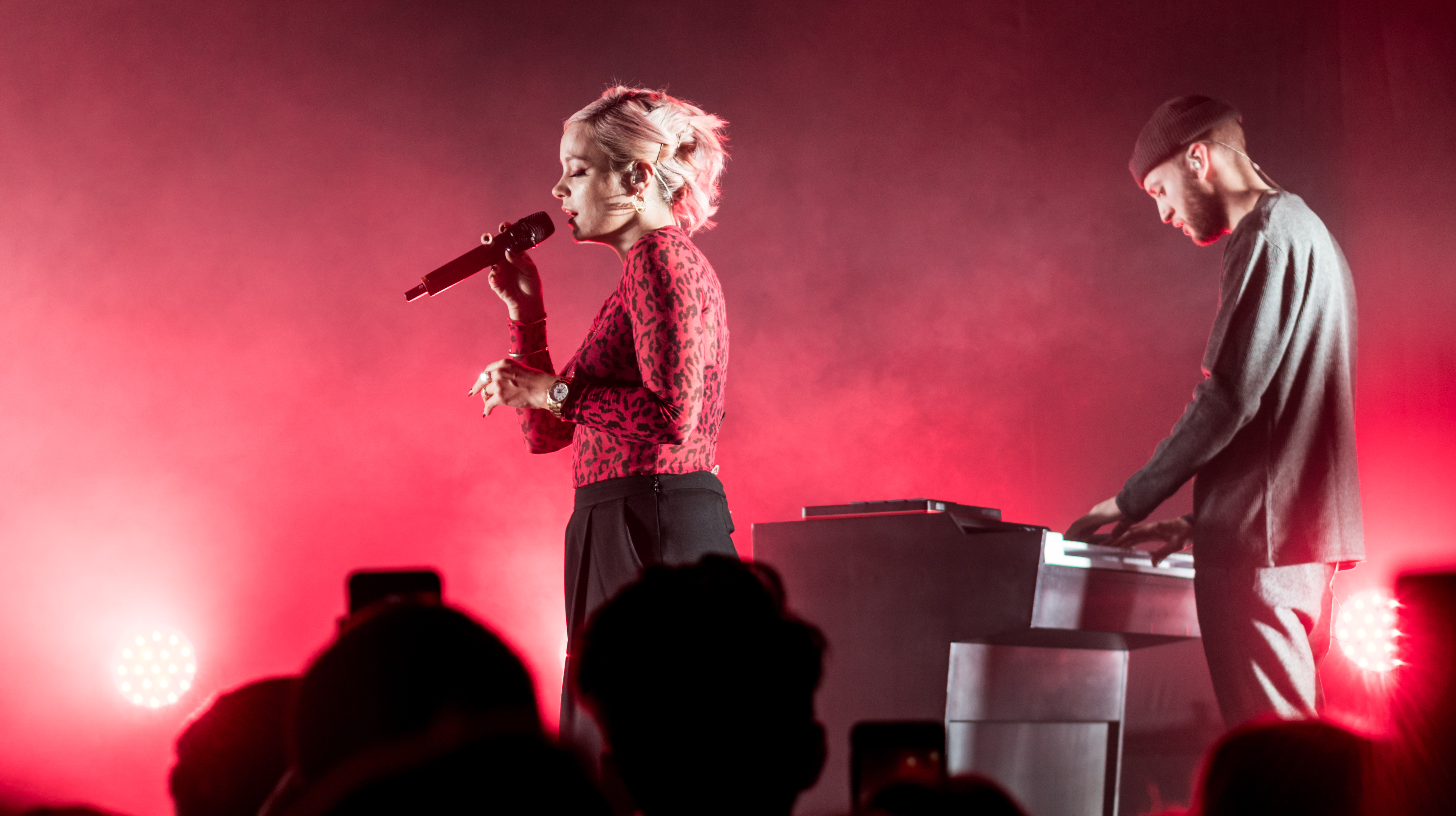 LilyTufnell210318-11